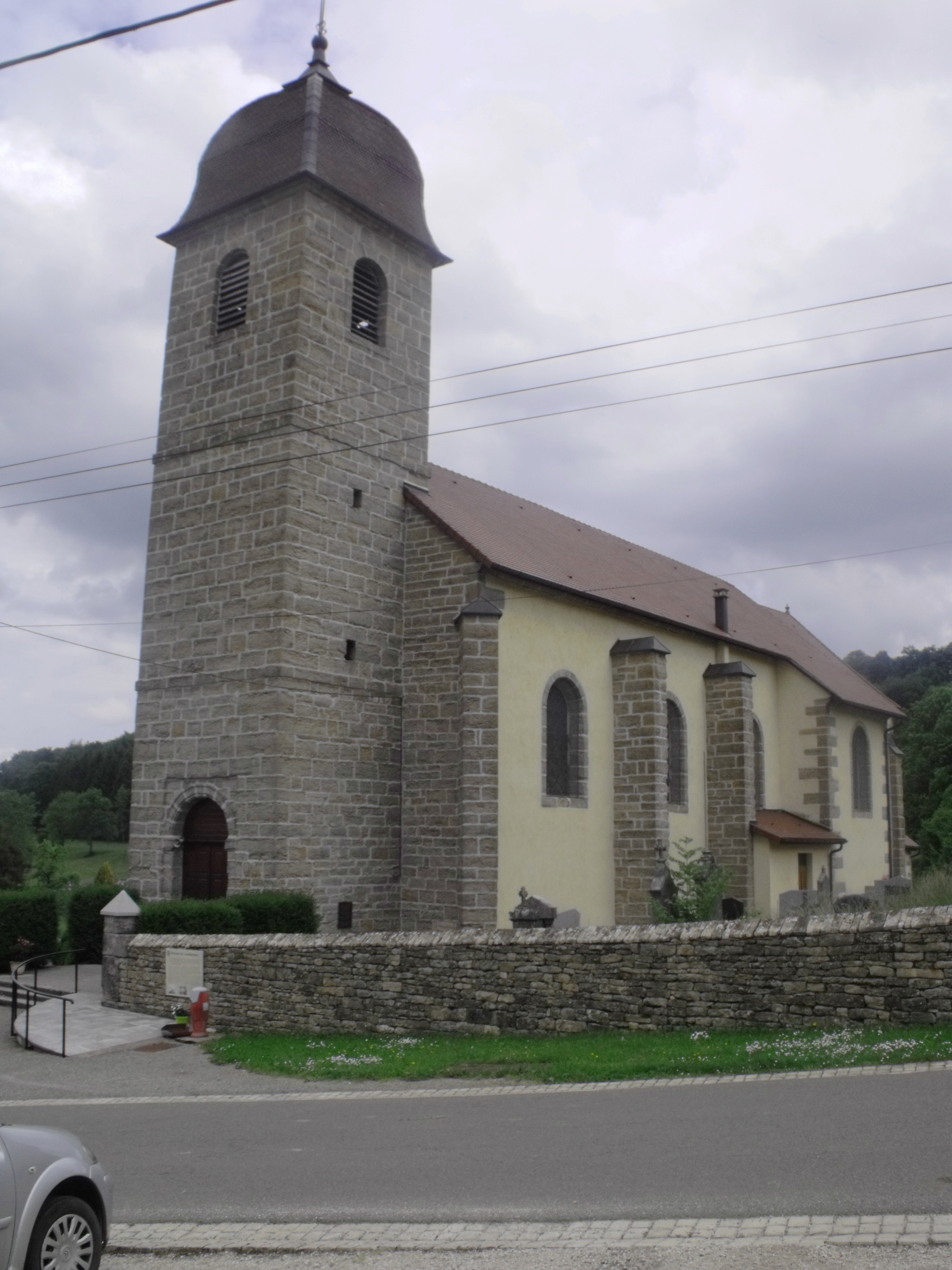 Eglise de Lanthenans, Doubs, France